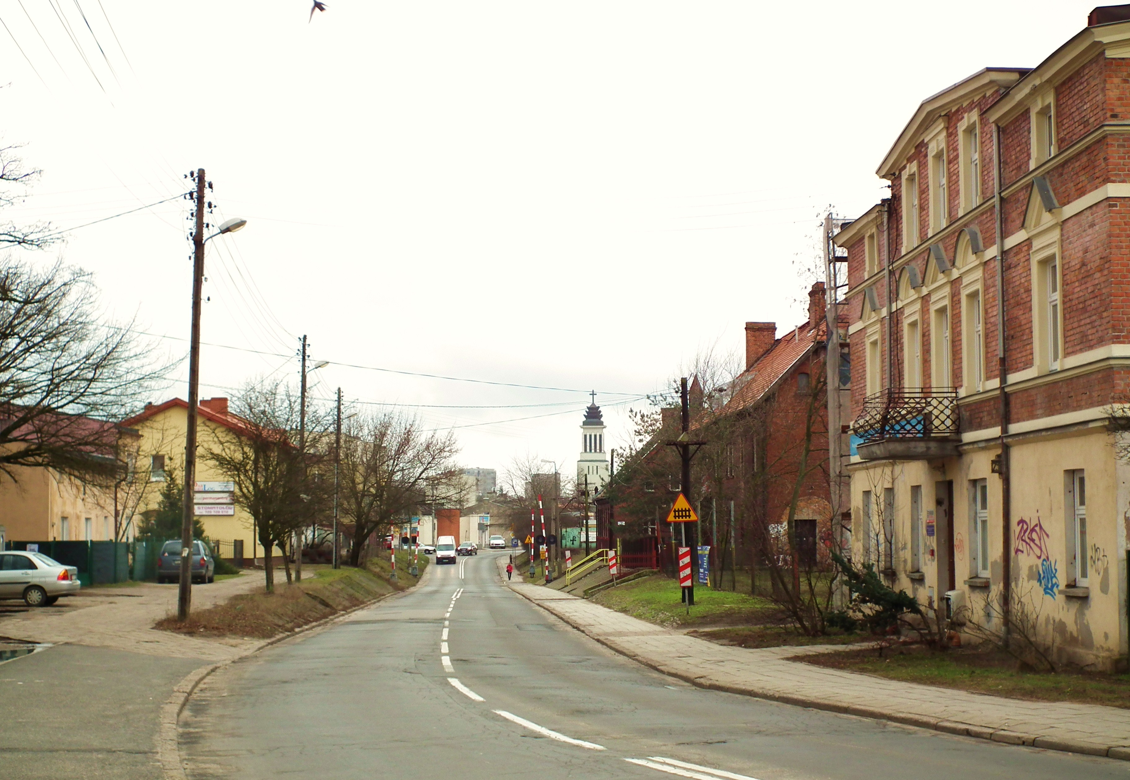 Dom bamberski na poznańskim Dębcu.